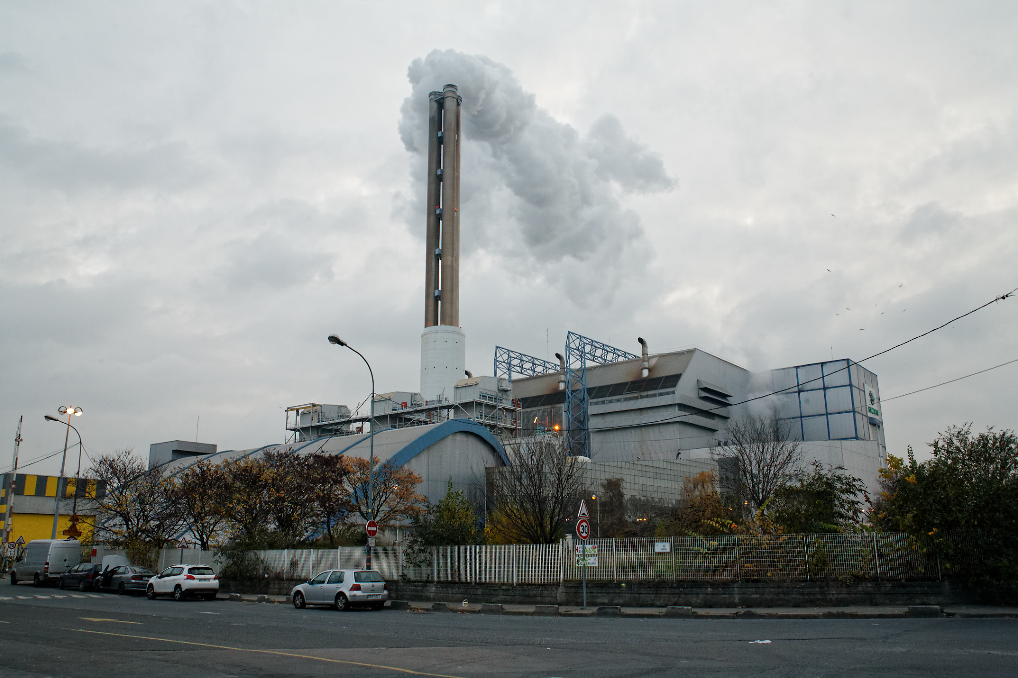 Usine d'incinération pour les déchets ménagers construit en 1990, produisant de la chaleur (chauffage urbain) et de l'électricité. Il traite les déchets de seize communes d'Île-de-France adhérant au syndicat mixte central de traitement des ordures ménagères (SYCTOM).